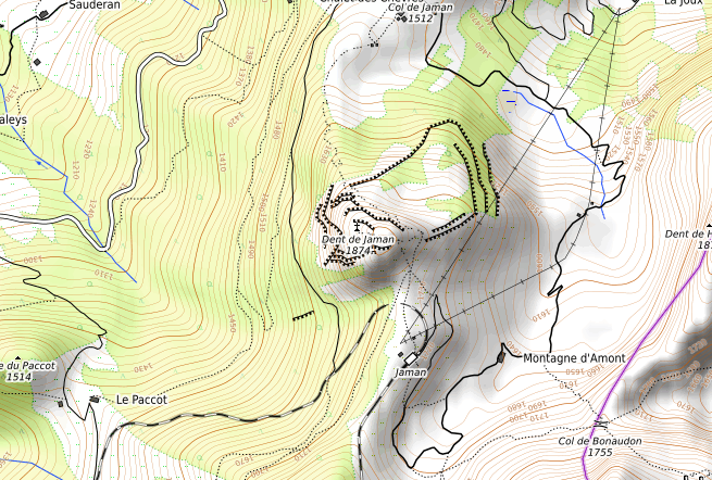 carte réalisée sur umap This map may be incomplete, and may contain errors. Don't rely solely on it for navigation.